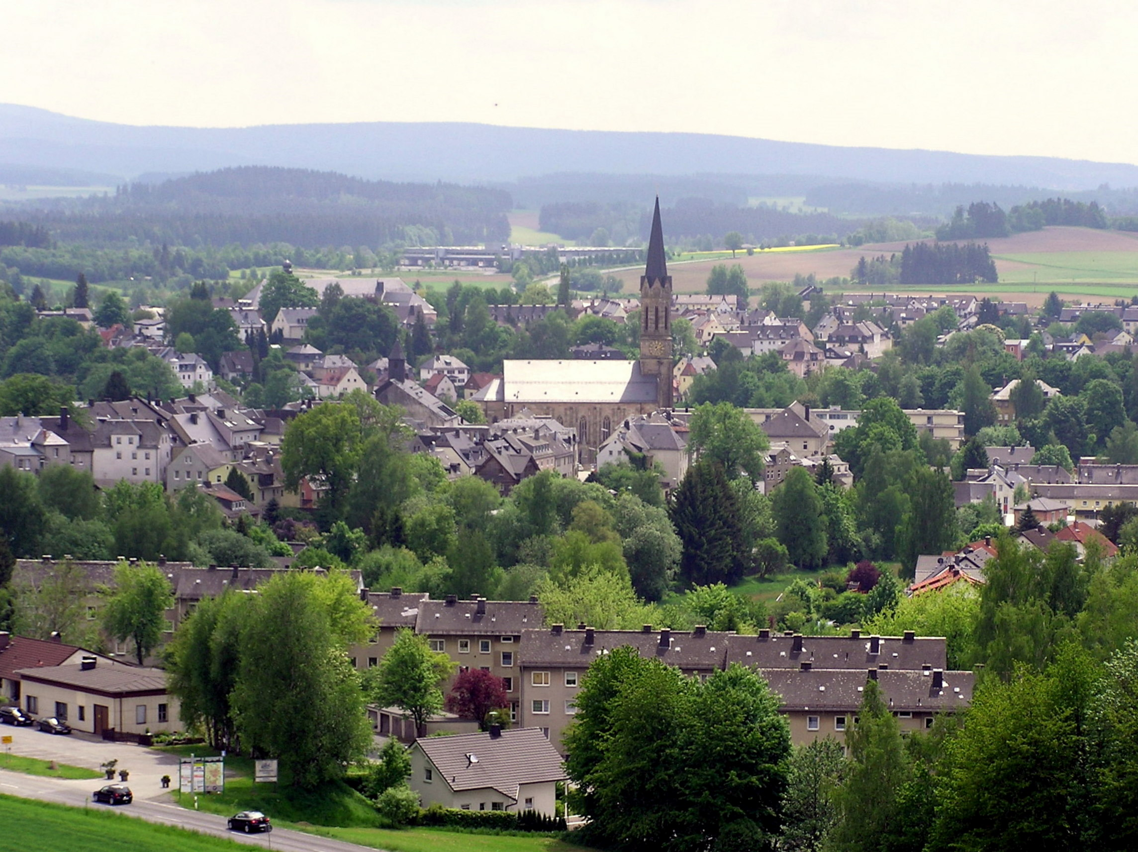 Blick auf Münchberg vom Aussichtsturm Rohrbühl